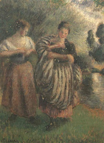 Camille Pissarro, M.Albert Pontremoli collection